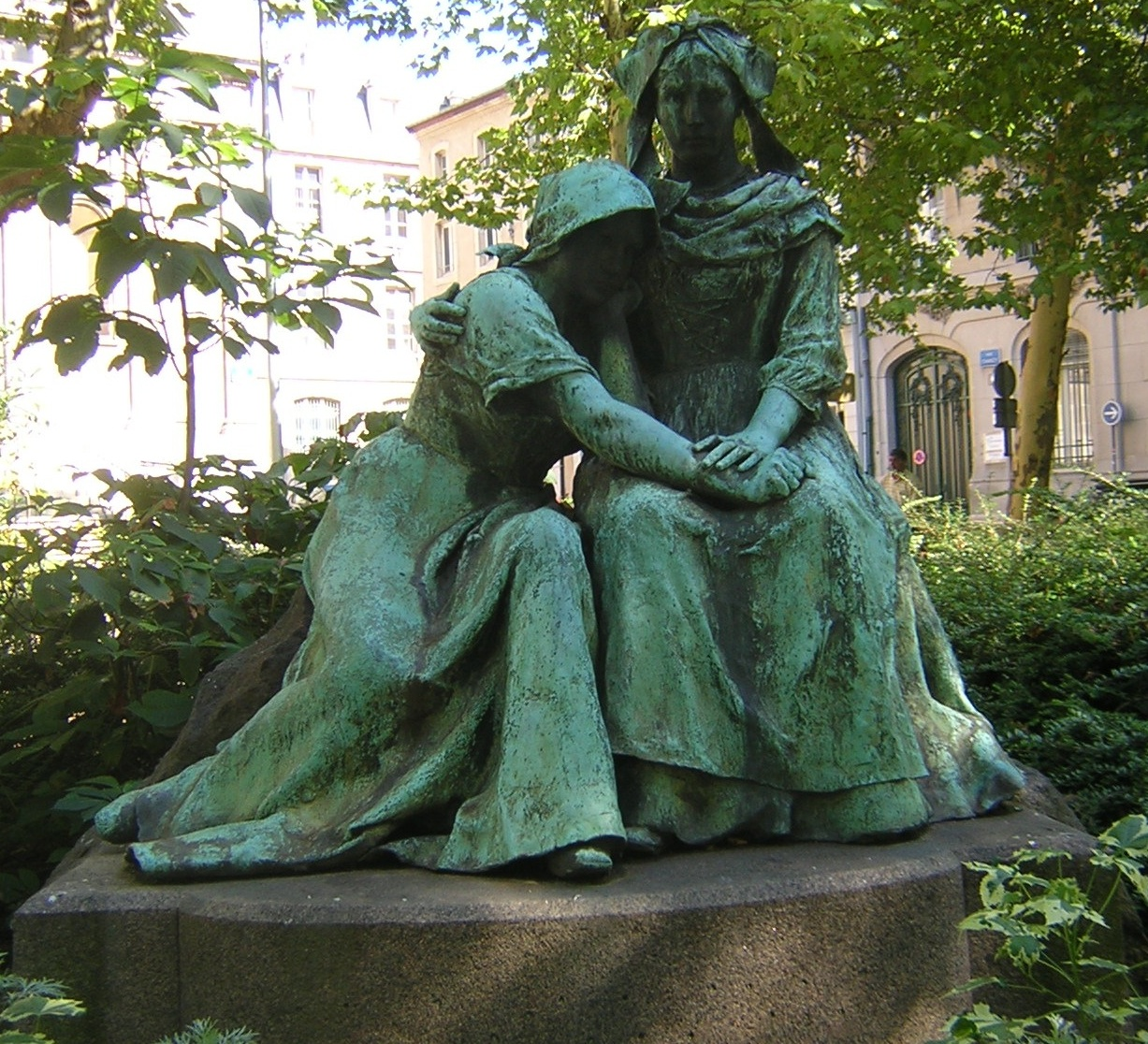 Statue située à la place Maginot (anciennement place Saint-Jean) à Nancy, intitulée Le Souvenir, commémorant la perte de l'Alsace et de la Moselle dans la guerre de 1870/71.